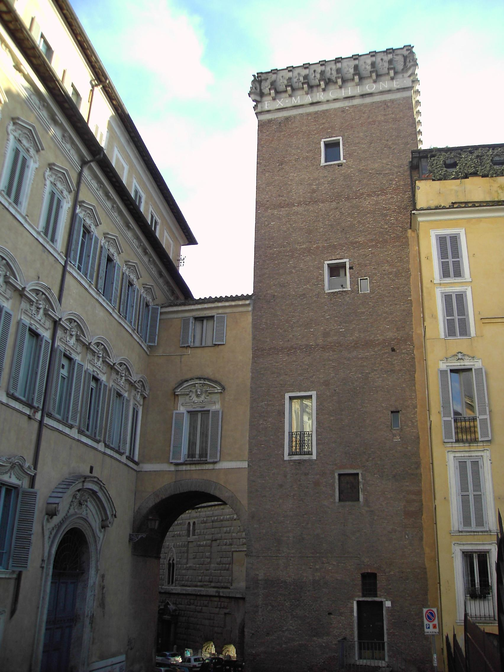 Roma , Torre del Grillo